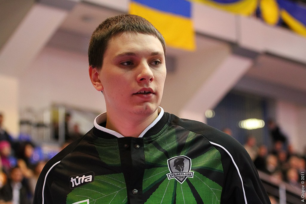 фото Лукашова